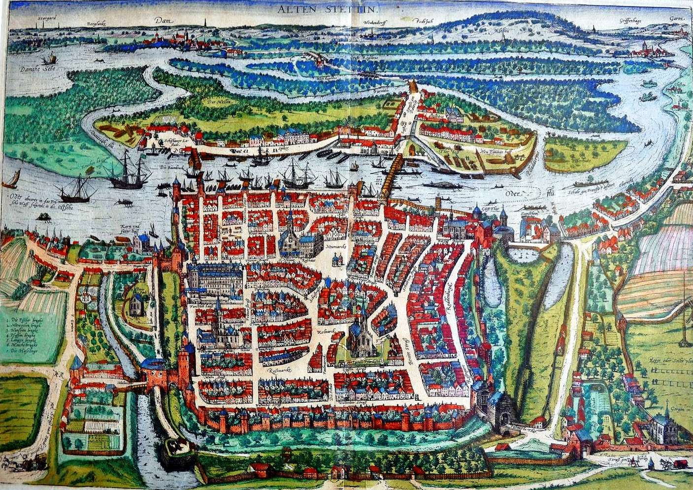 Najstarszy zachowany widok Szczecina "Alten Stettin", oryginalny ręcznie kolorowany miedzioryt z 1630 roku. Grafika z pracy Georga Brauna & Fransa Hogenberga „Civitates Orbis Terrarum” t. IV z 1581 roku; miedzioryt pochodzi z późniejszego wydania – Bleau, Amsterdam 1630 r.; wymiar arkusza: 540 mm x 400 mm, wymiar płyty: 475 mm X 330 mm. Dodatkowy opis: Na odwrocie widoku opis miasta w jęz. łacińskim. Rycina przedstawia Szczecin z lotu ptaka. Znajdują się na niej Zamek Książąt Pomorskich, ratusz miejski, Kościoły NMP, św. Jakuba, św. Jana oraz św. Mikołaja. Poza murami widoczne są przedmieścia Górny i Dolny Wik oraz podmiejskie ogrody. Przedstawiono nabrzeża portowe, a także mosty Długi i Kłodny. Autorzy szczegółowo opisali szczecińskie ulice, place oraz ważniejsze obiekty. Z lewej strony arkusza umieszczono legendę. W oddali schematycznie zaznaczono m. in. Stargard, Dąbie, Podjuchy oraz Gryfino.